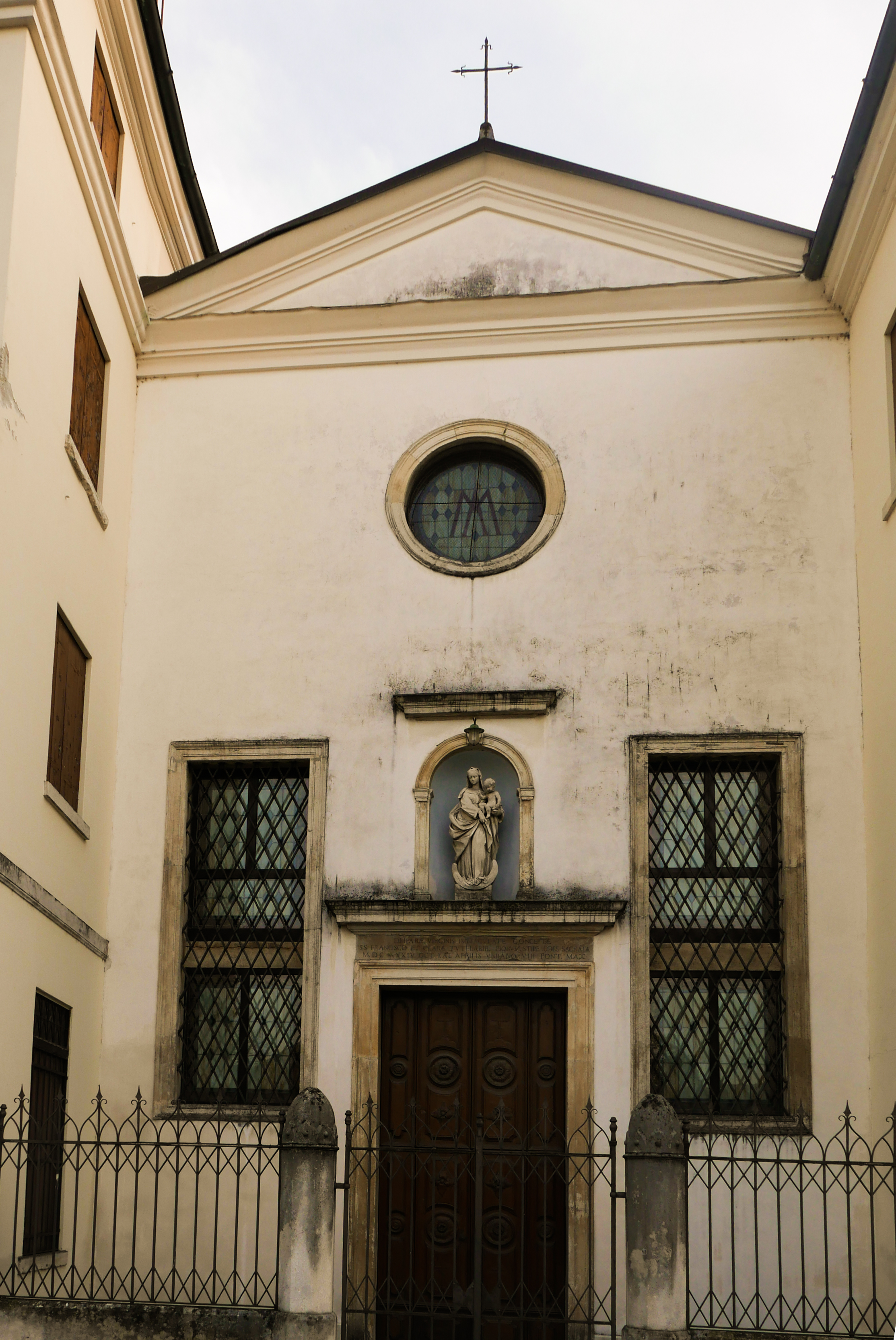 Oratorio delle Cappuccine, ora Cappella della Casa della Provvidenza